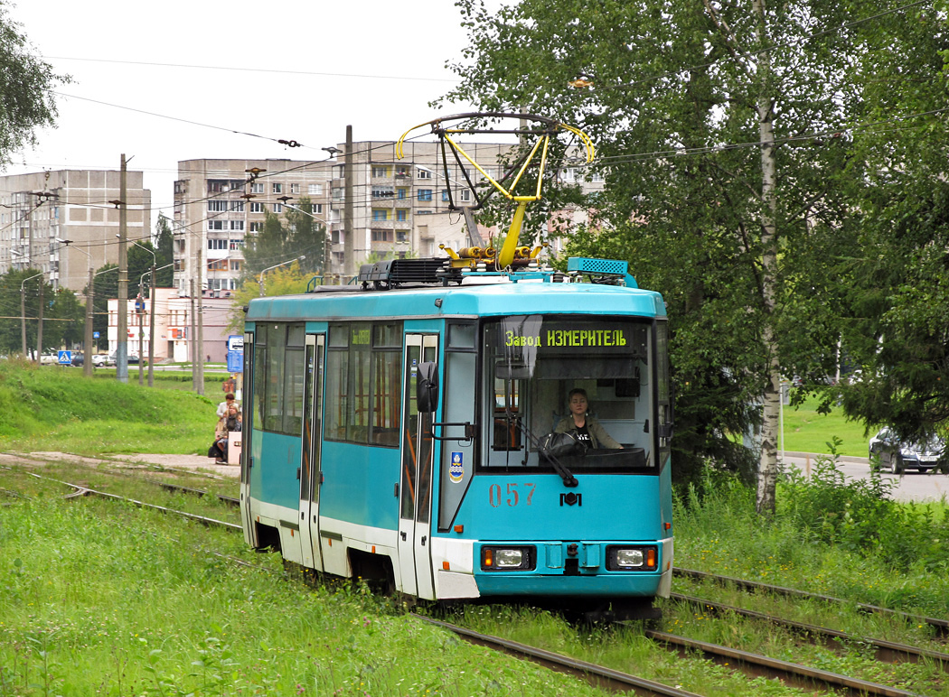 Новополоцк БКМ-60102 № 057